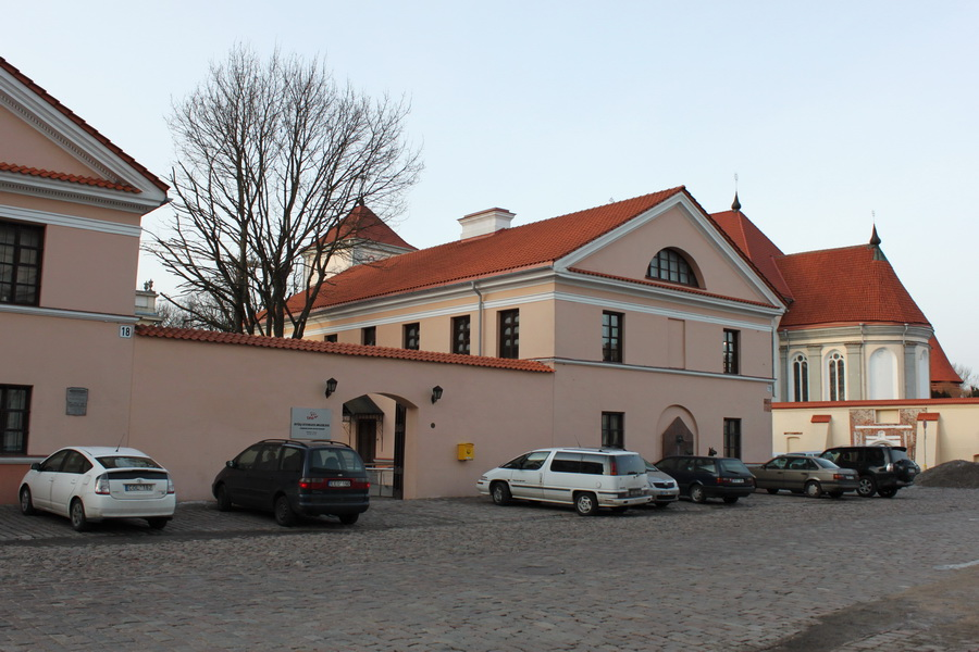 Ryšių istorijos muziejus Kaune.